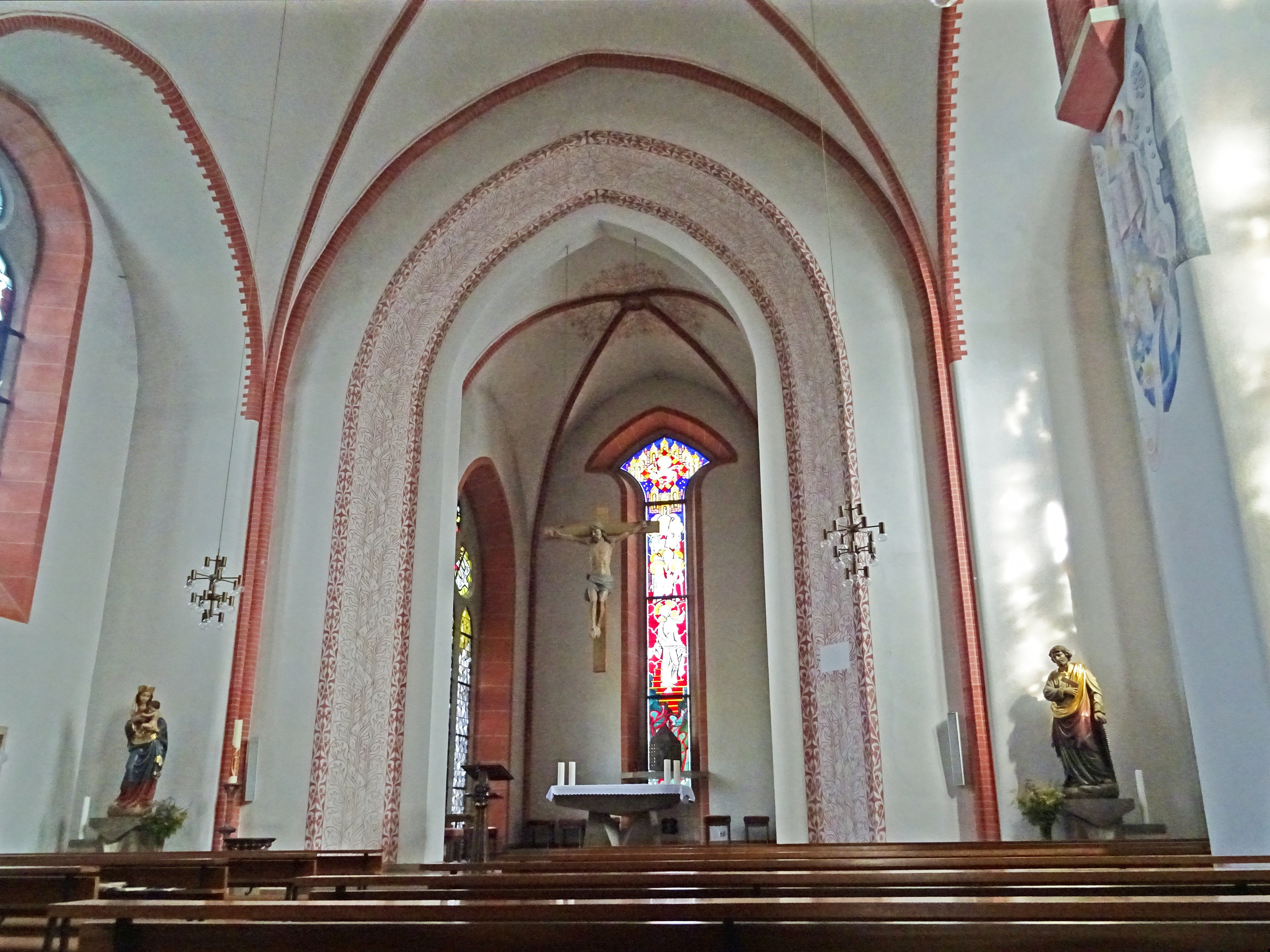 Blick zum Altar in der Kirche St. Josef (Herzberg am Harz)